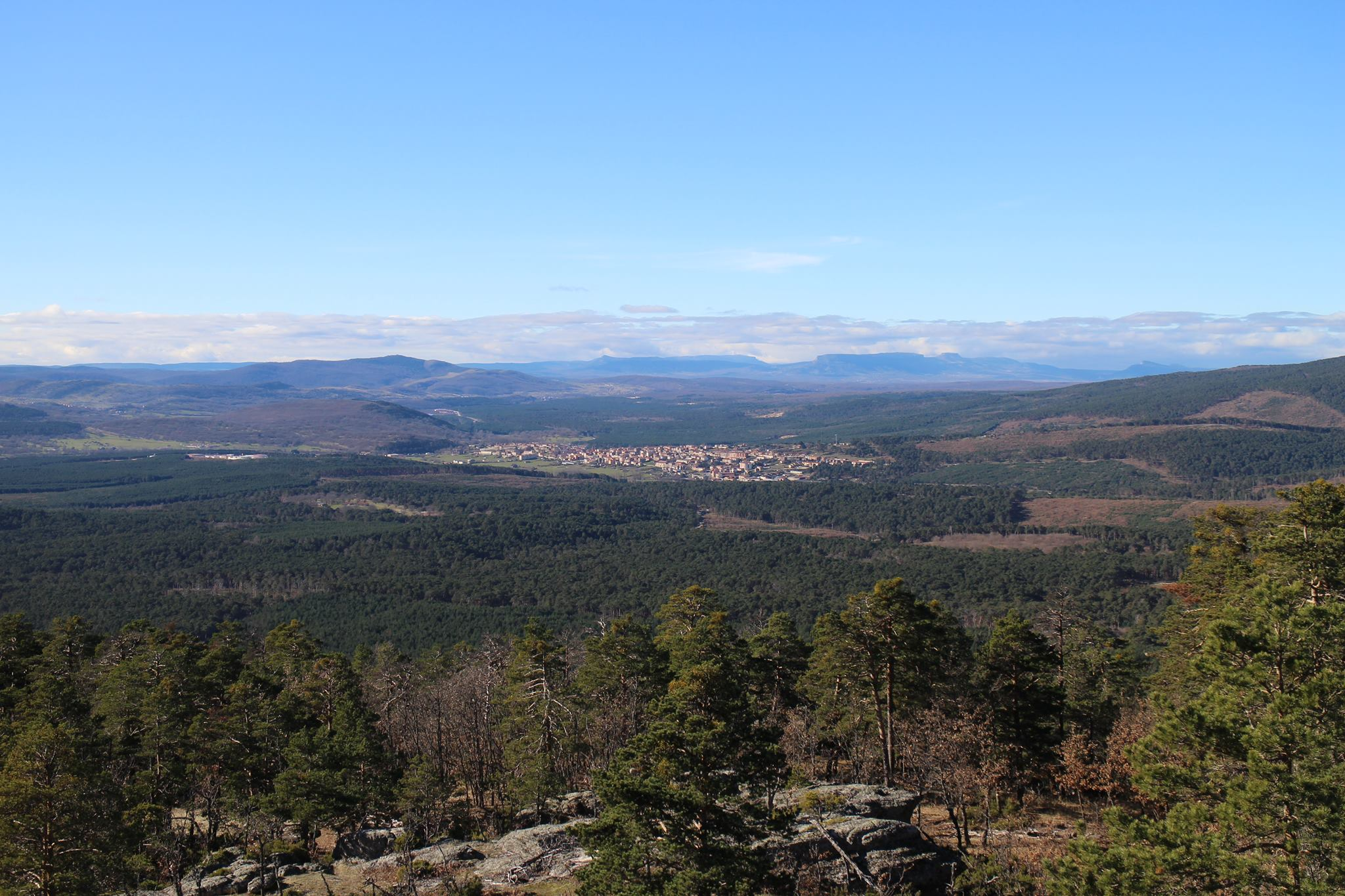 Vista de Quintanar de la Sierra, Burgos